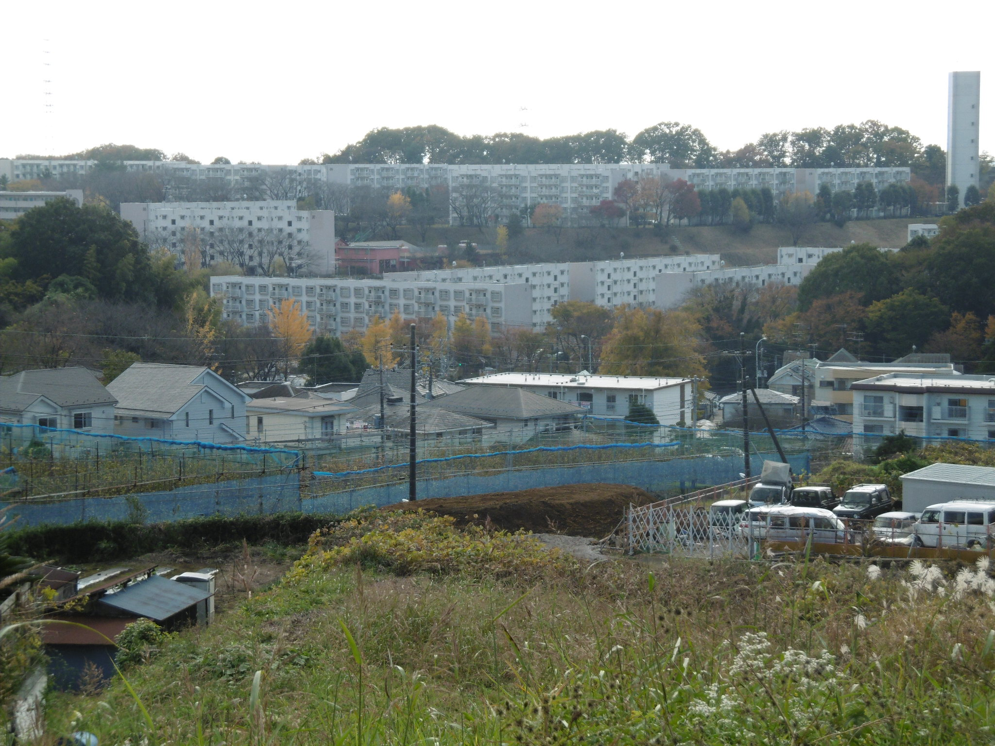 東京都稲城市の南部に位置する平尾地区。奥に見えるのは平尾団地。